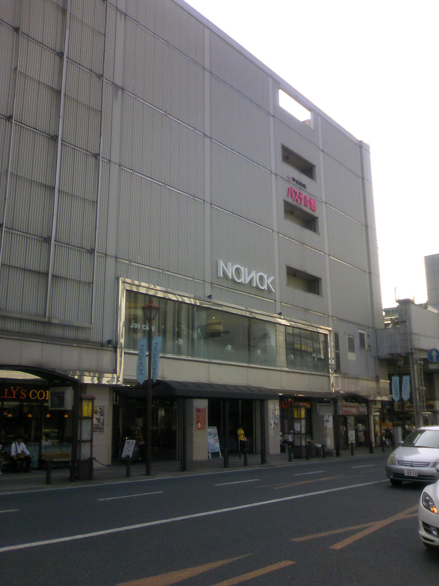 岩手県盛岡市の商業施設「Nanak（ななっく）」